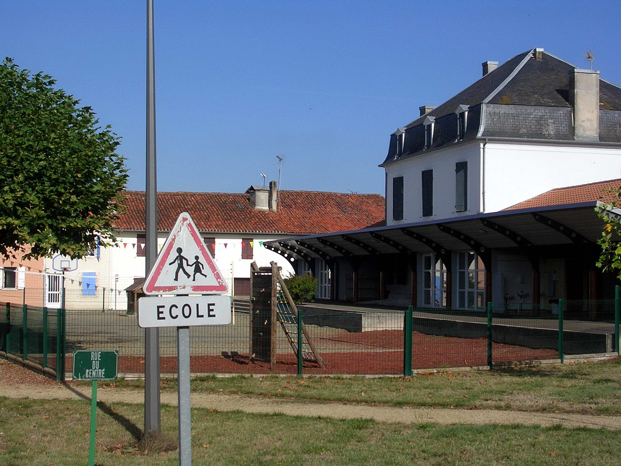 Ecole de Saint-Maurice-sur-Adour, dans le département français des Landes